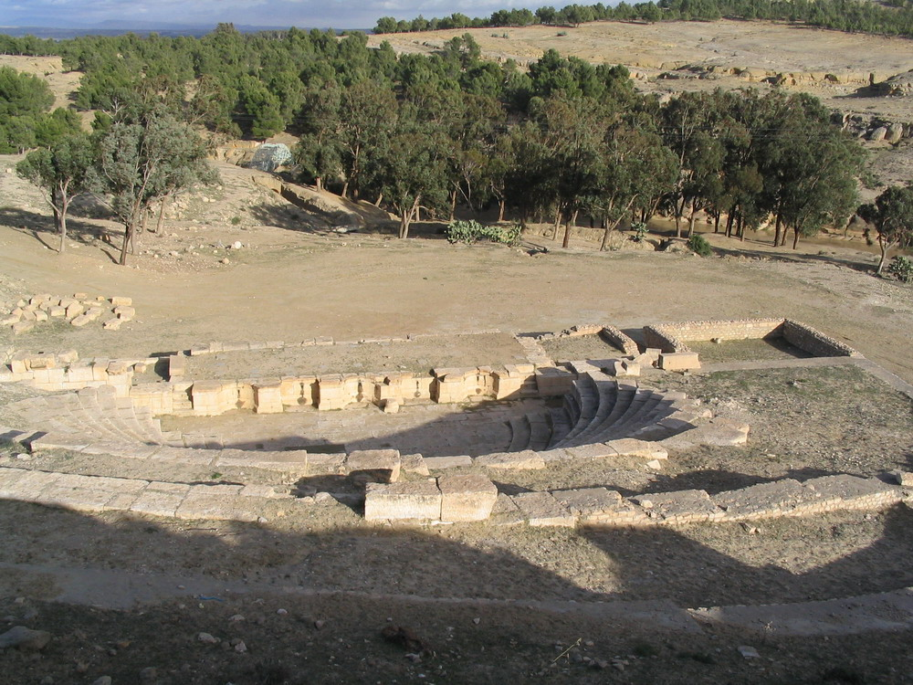 théâtre romain